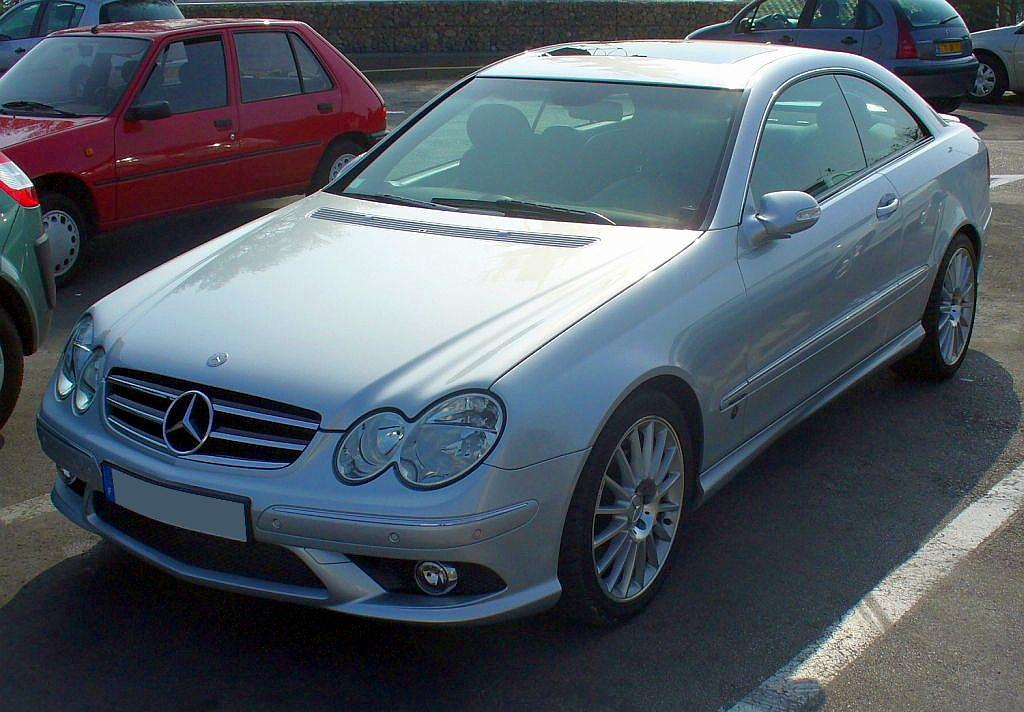 Mercedes-Benz CLK Coupé